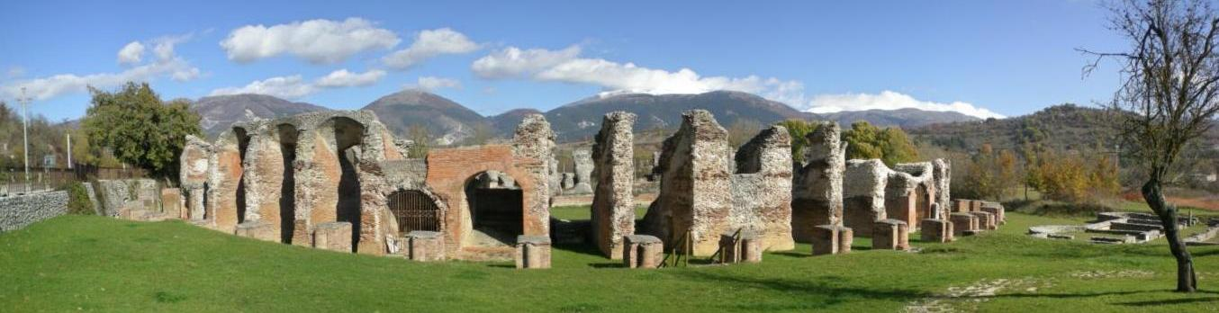 Panoramica dell'anfiteatro di Amiternum, vicino L'Aquila